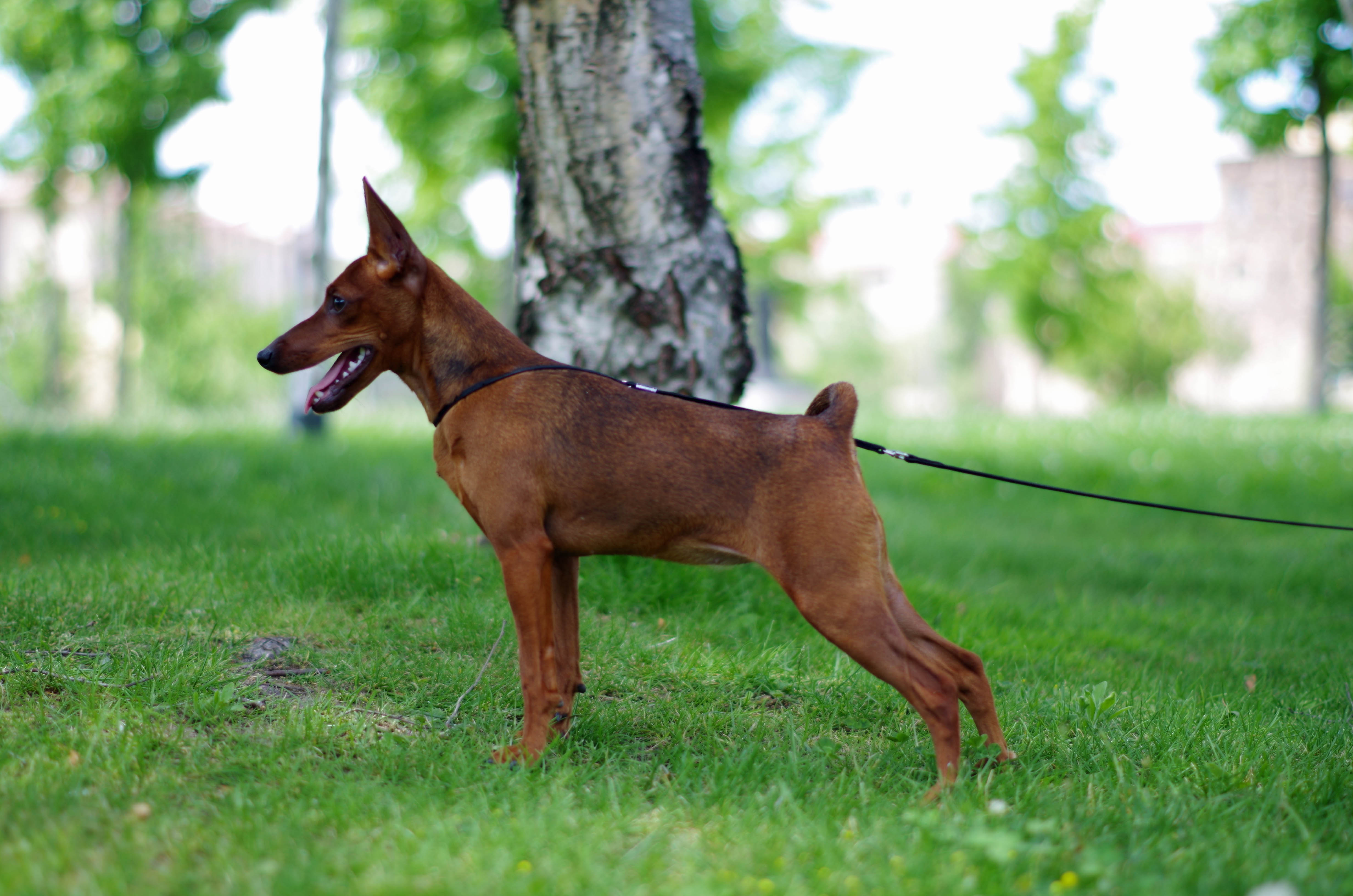 Morfología actual del Pinscher Miniatura europeo.